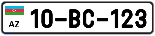 Azərbaycan Respublikası Dövlət Qeydiyyat Nişanları